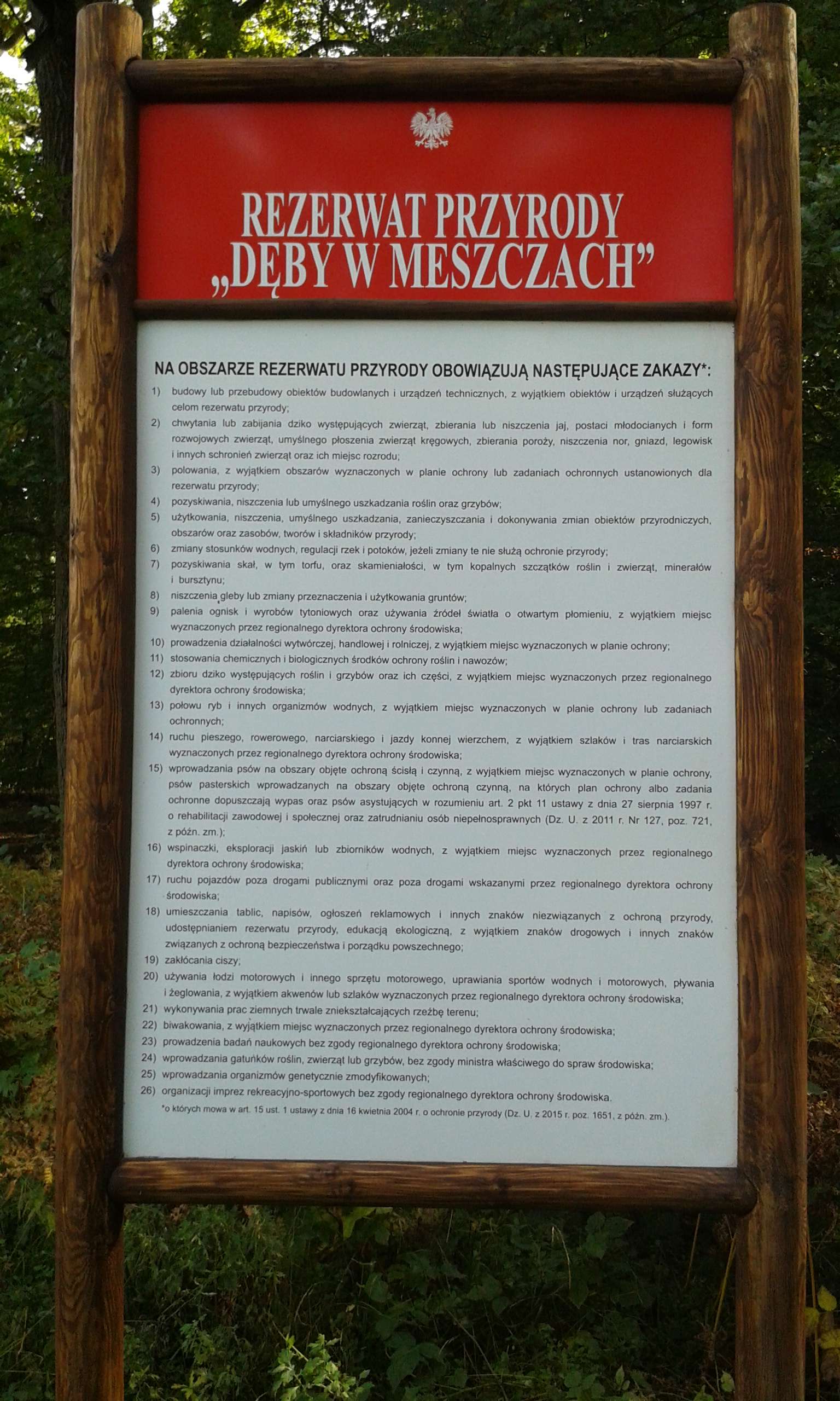 Tablica informacyjna w rezerwacie